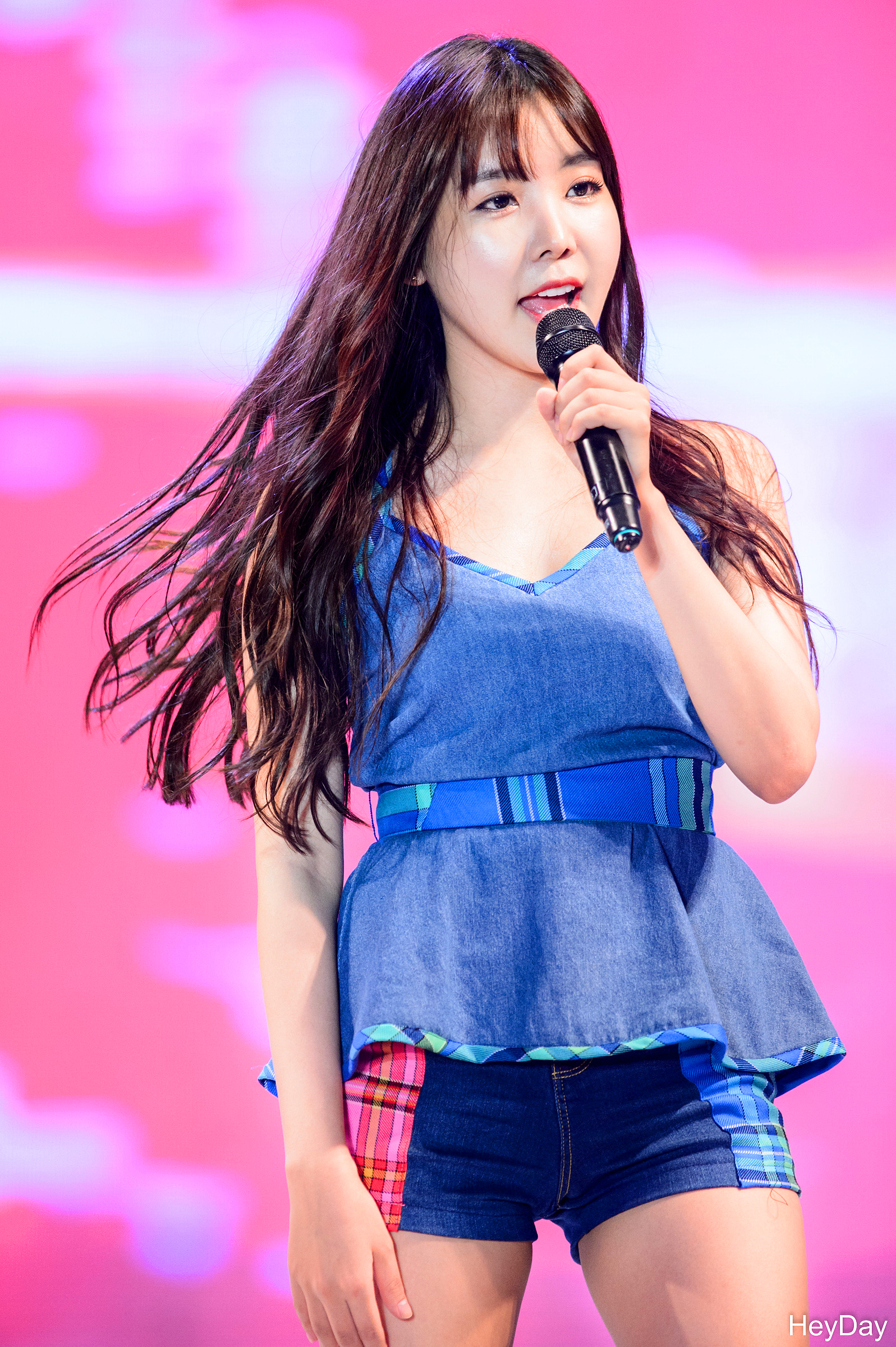 150802 수원 KT WIZ 시민 서포터즈 페스티벌 - 오렌지캬라멜